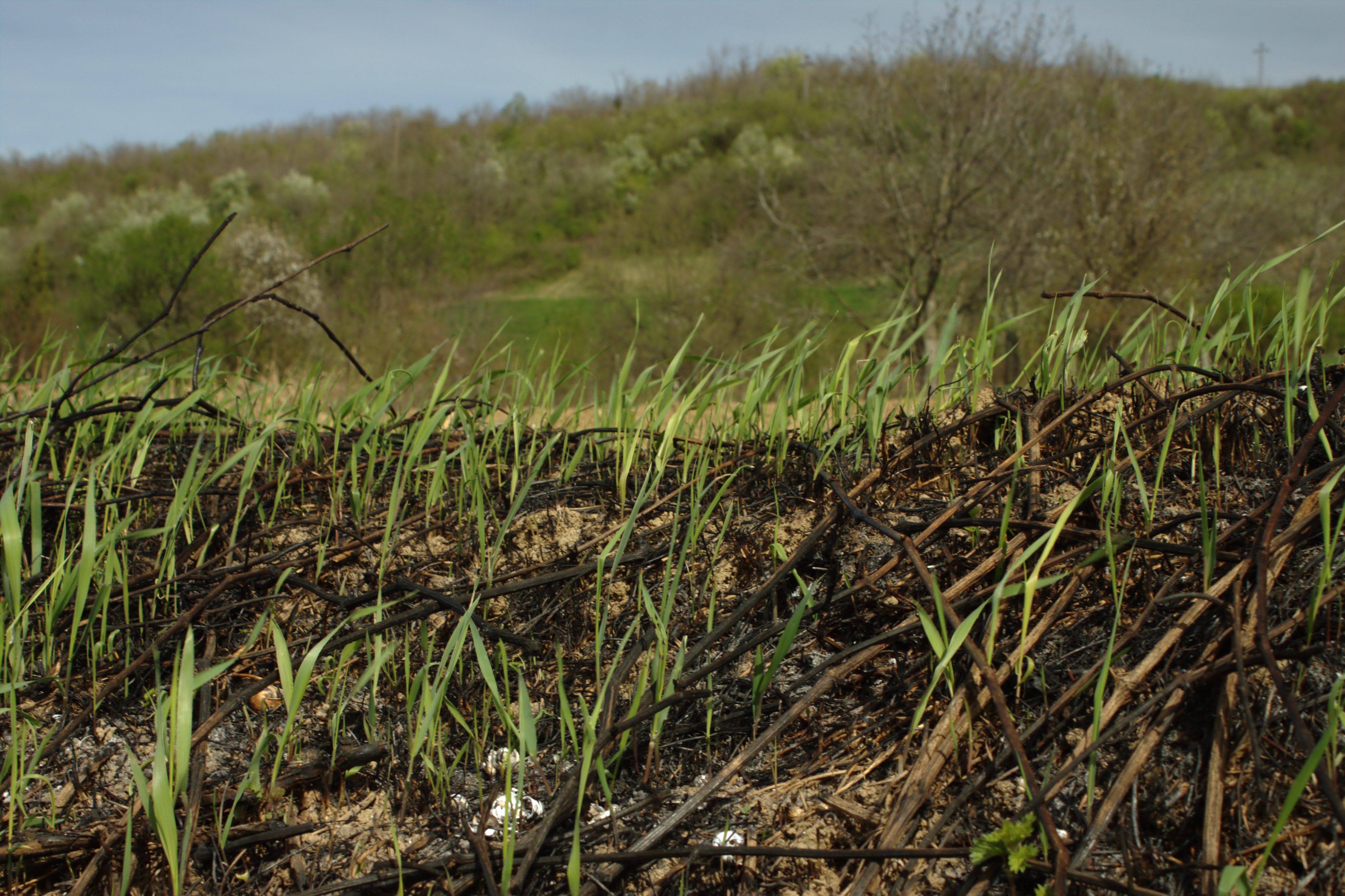 Vypalování trávy jihozápadně od Sremských Karlovců na začátku jara, Srbsko